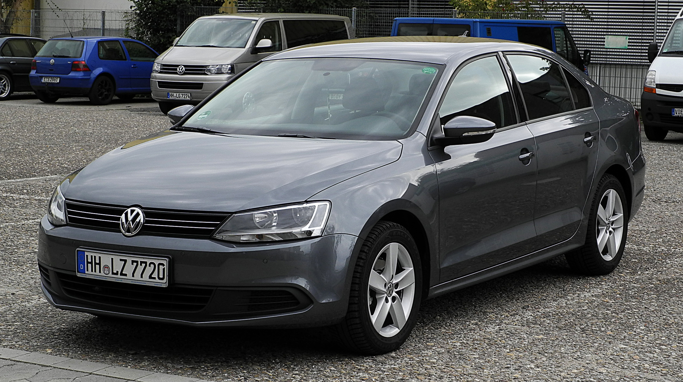 VW Jetta 1.6 TDI Comfortline (VI)